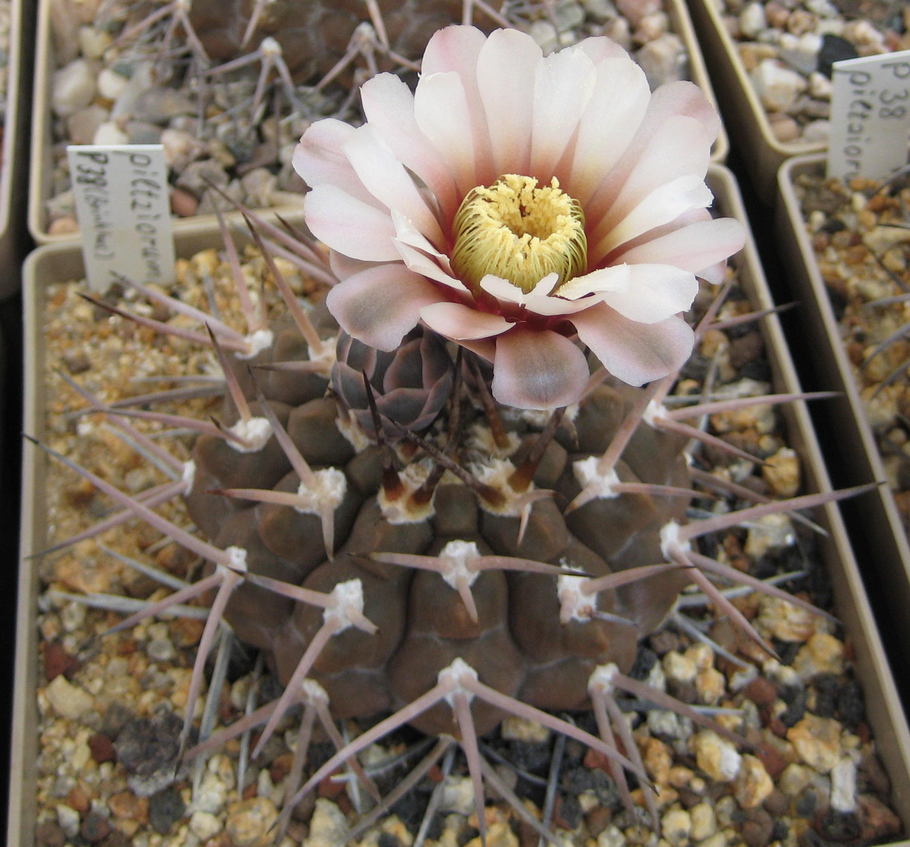 Gymnocalycium riojense ssp. piltziorum in Kultur